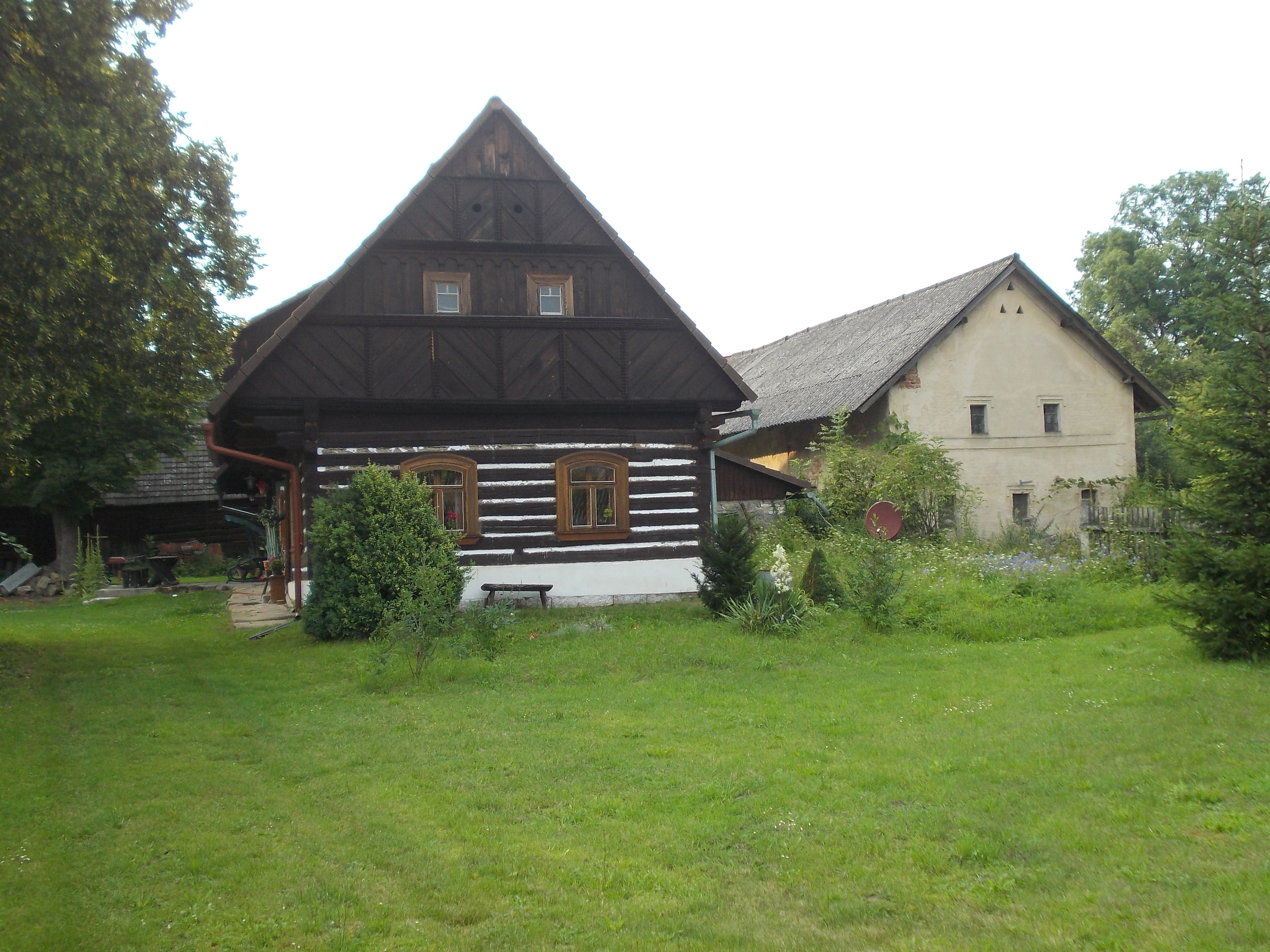 Zámezí - dům č.p. 5